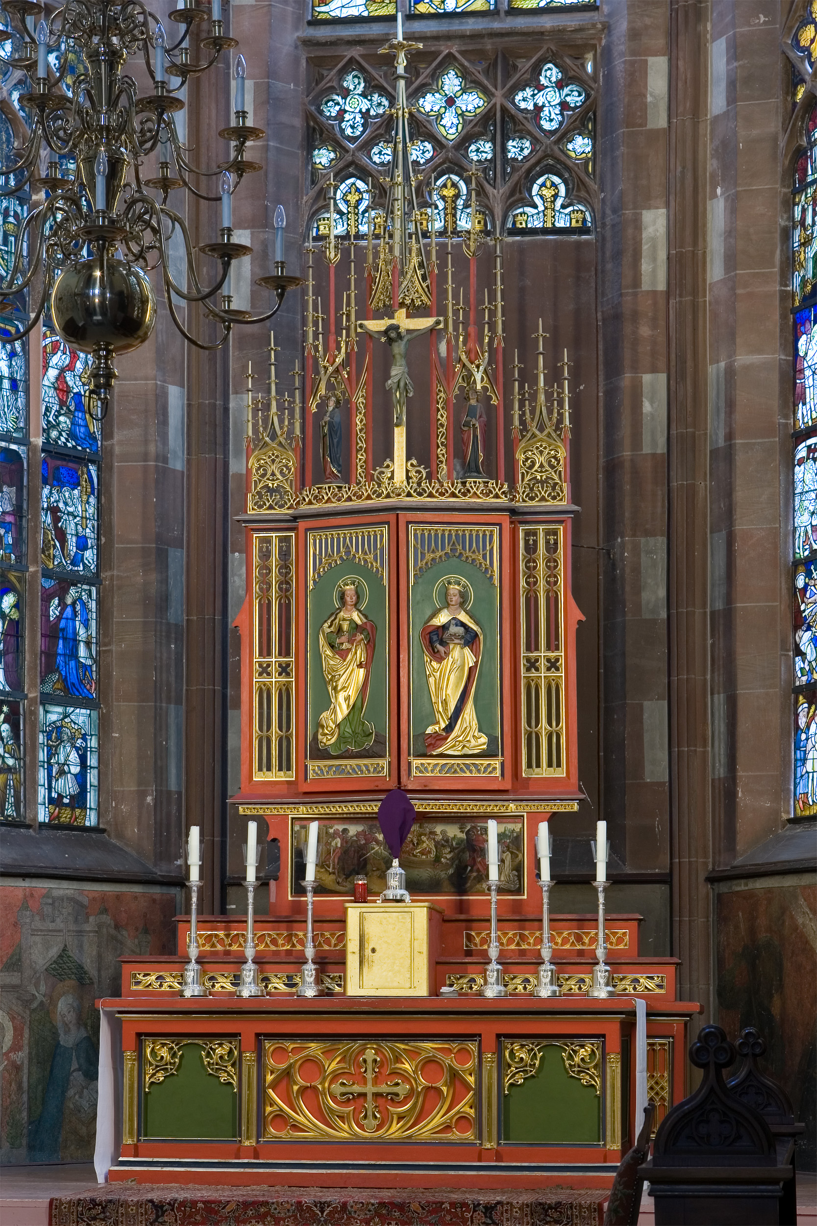 Hochaltar im Hochchor der Leonhardskirche in Frankfurt am Main, geschlossener Zustand. Predellengemälde zweite Hälfte 15. Jahrhundert, Mittelschrein um 1500, Ergänzungen des 19. Jahrhunderts (Gesprenge mit Kreuzigung). Selber fotografiert im März 2008, Doppellizensierung GFDL & CC-BY-SA 2.5.